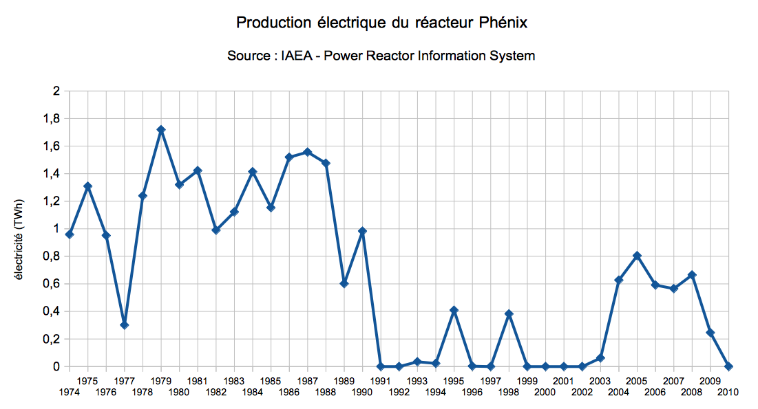 Production électrique du réacteur à neutrons rapides Phénix, exploité par le CEA et EDF sur le site de Marcoule de 1973 à 2009.